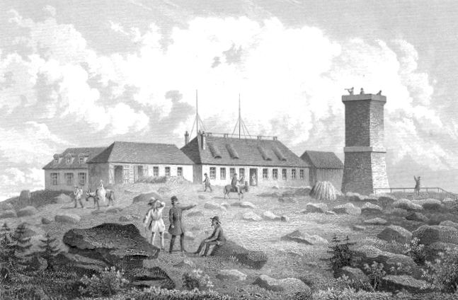 Brocken